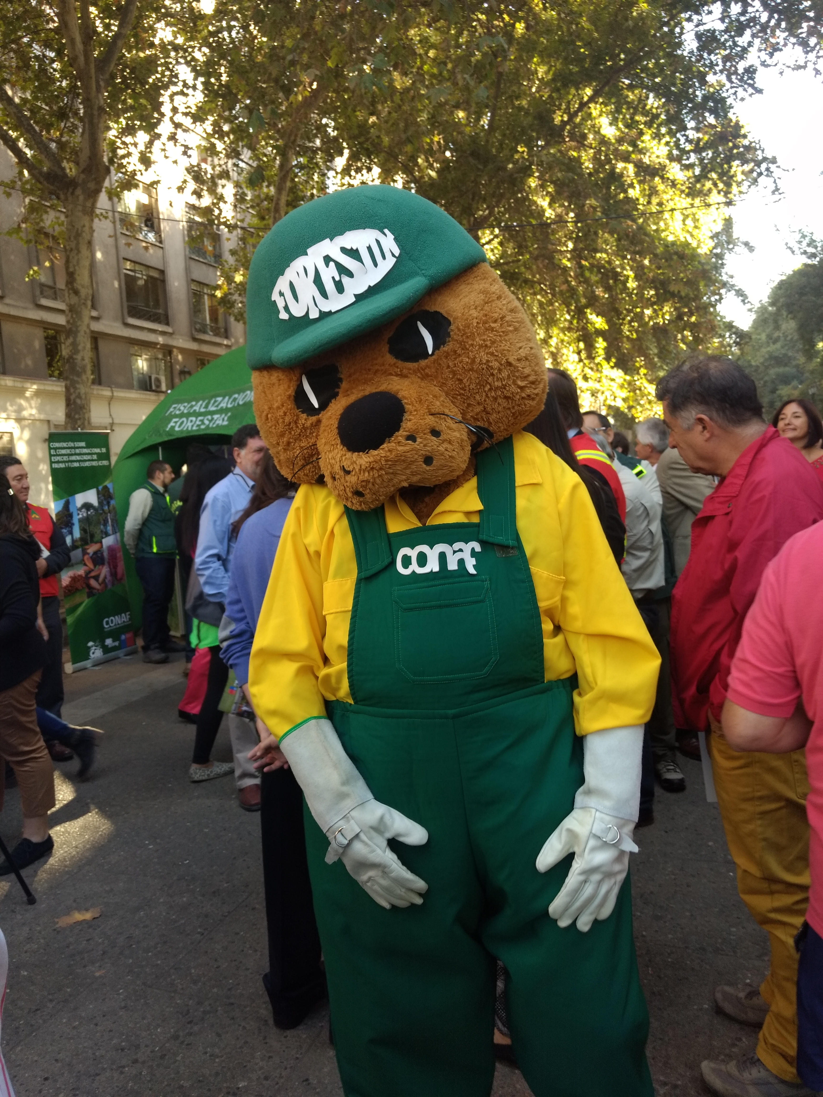 Forestín es la mascota oficial de la Corporación Nacional Forestal (CONAF) de Chile.1​ Es un coipo (Myocastor coypus), que puede vestir como brigadista de incendios (chaqueta ignífuga amarilla y casco), guardaparques (camisa verde y quepi) o forestador/viverista (camisa amarilla y jardinera verde), que fue ideado para educar al público sobre los peligros de los incendios forestales.